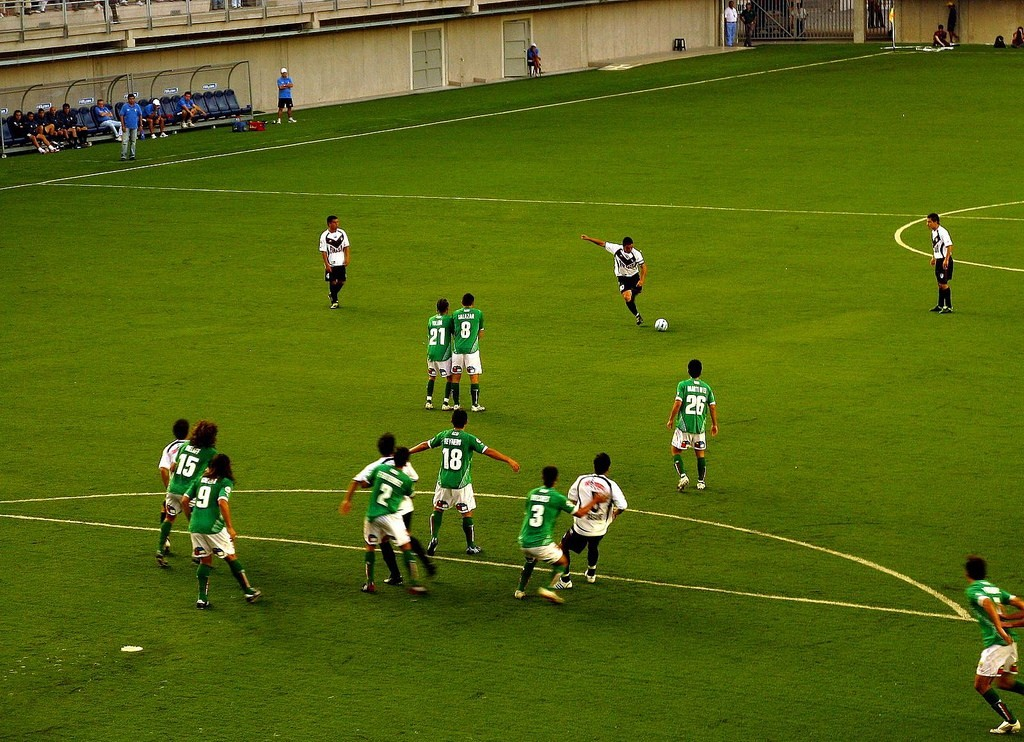 Audax Italiano (verde/green) 1 vs 1 Santiago Morning (blanco/white) Estadio Bicentenario Municipal de La Florida Comuna de La Florida, Santiago de Chile